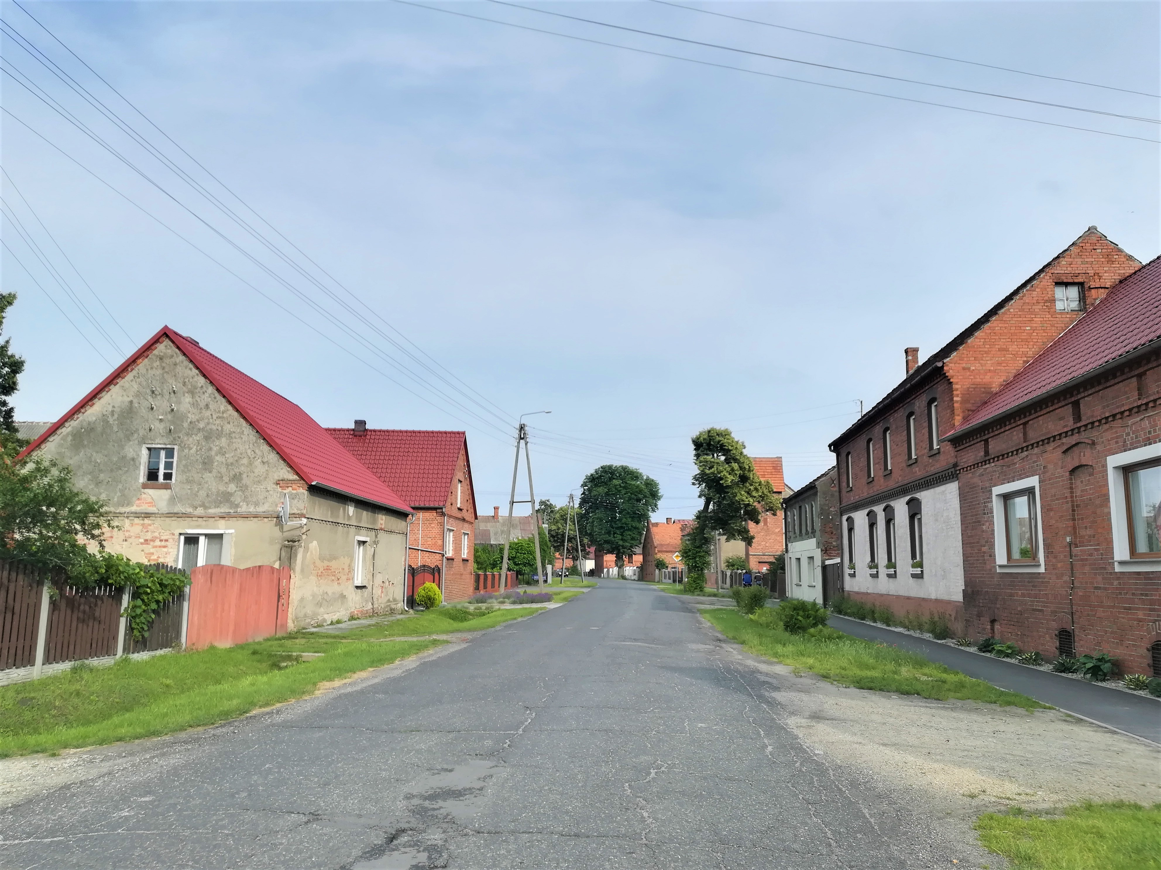 Fragm. Korzeńska koło Żmigrodu.